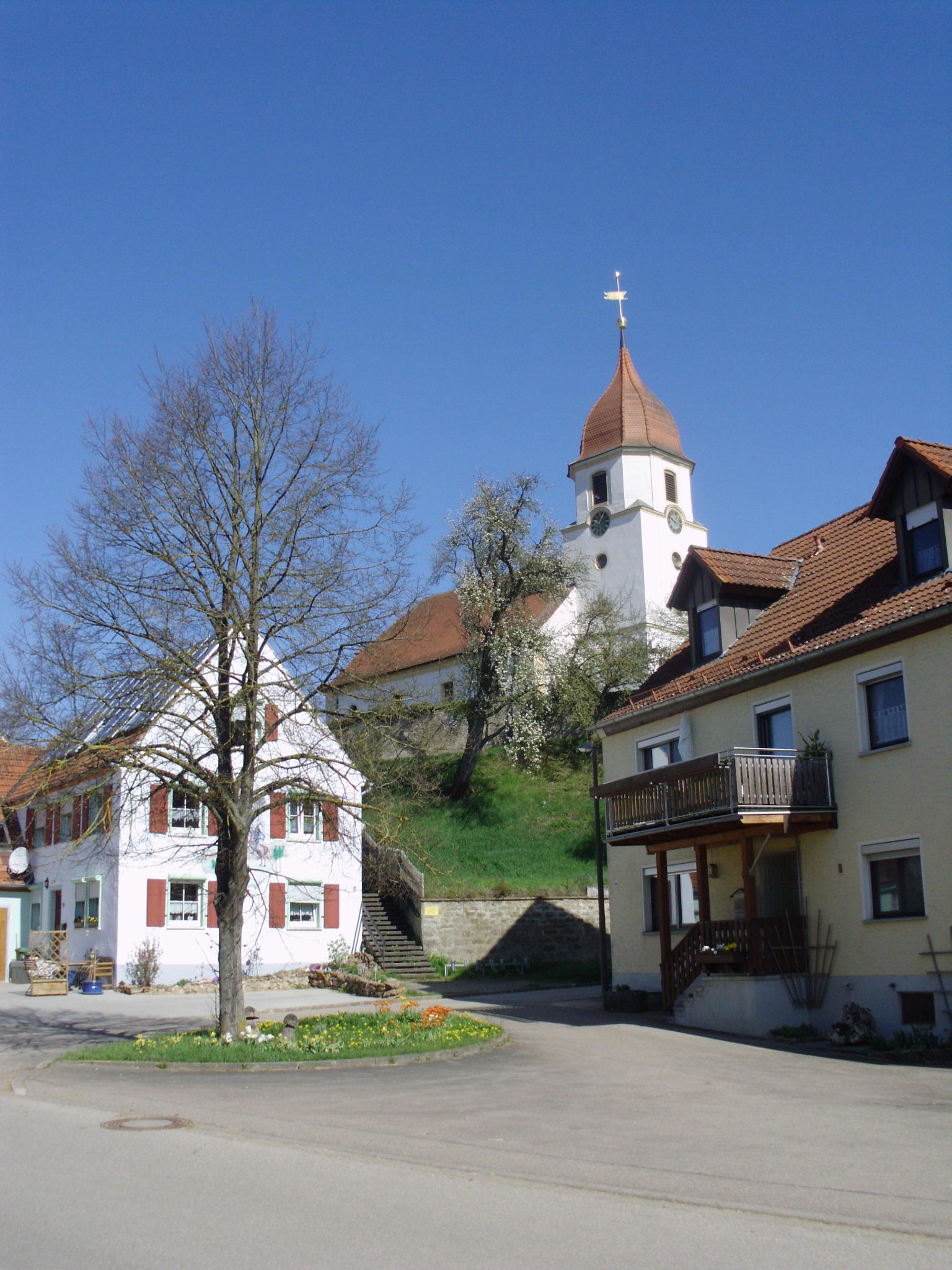 Altentrüdingen, Gemeindeteil von Wassertrüdingen im Landkreis Ansbach, die erhöht stehende Ev.-Luth. Pfarrkirche Nikolaus-und Theobaldkirche